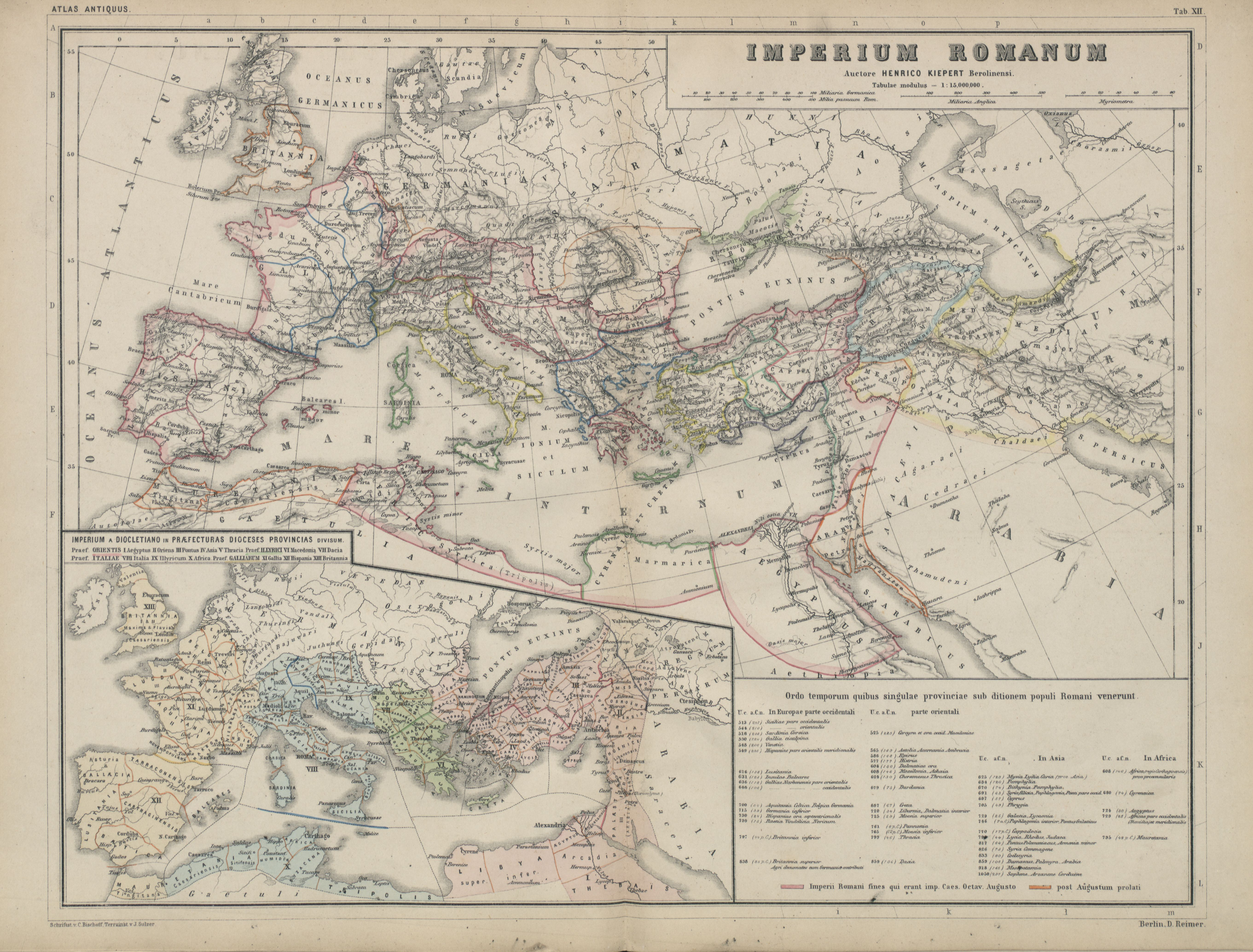 z atlasu "Atlas antiquus. Zwölf Karten zur Alten Geschichte"